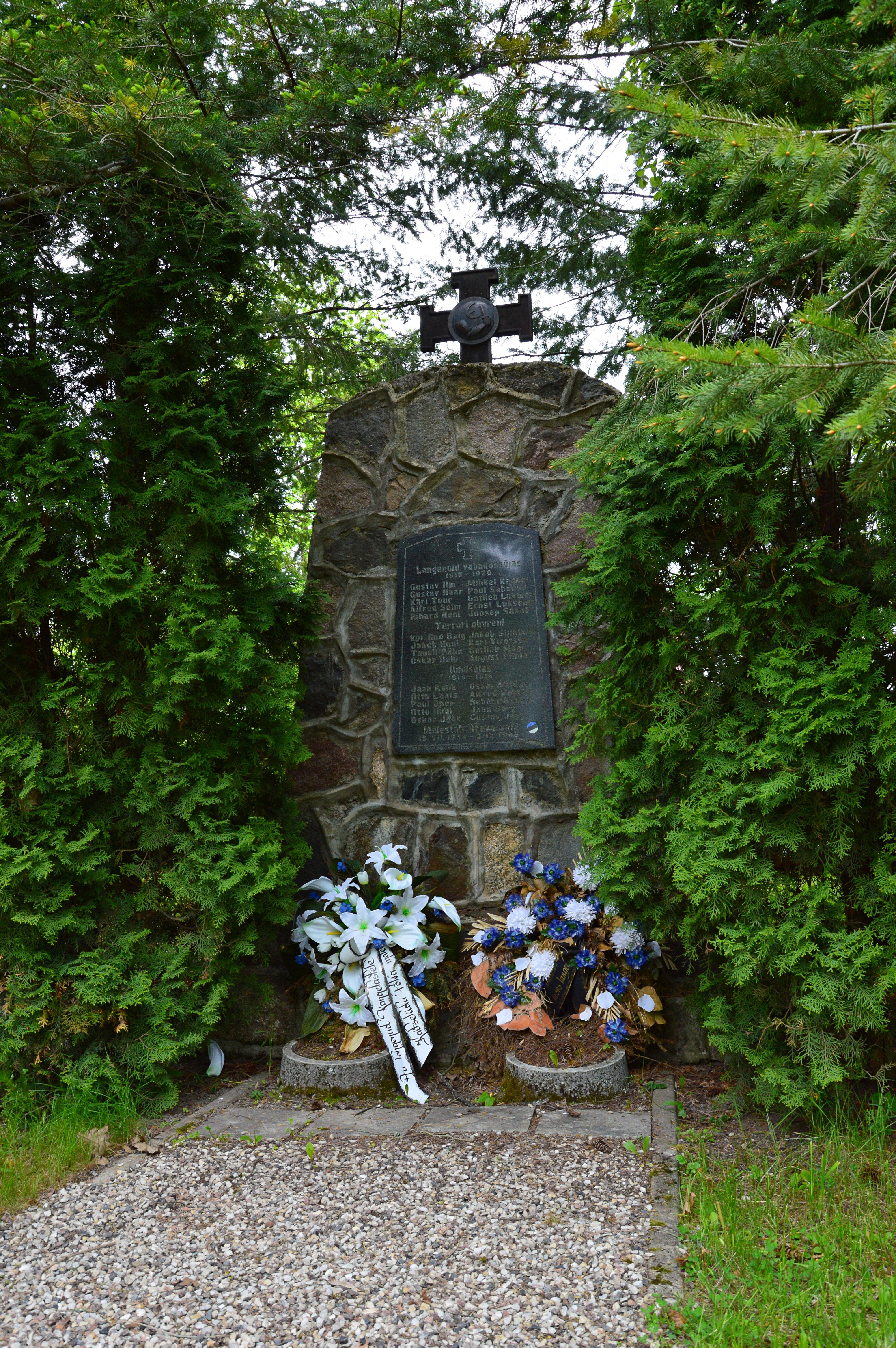 Orava Vabadussõja mälestussammas.